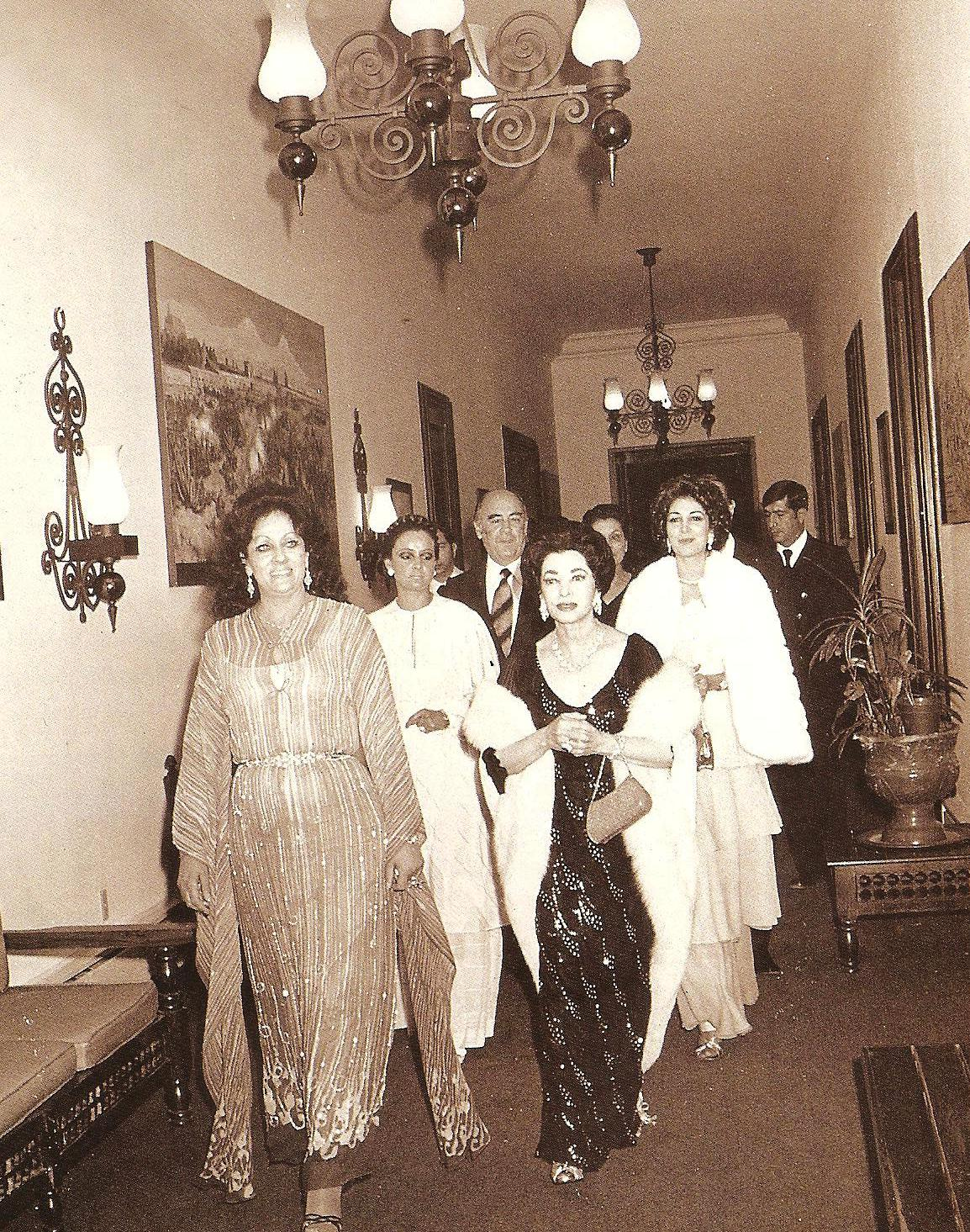 Carmen Romano y JOLOPO con monarcas iraníes.